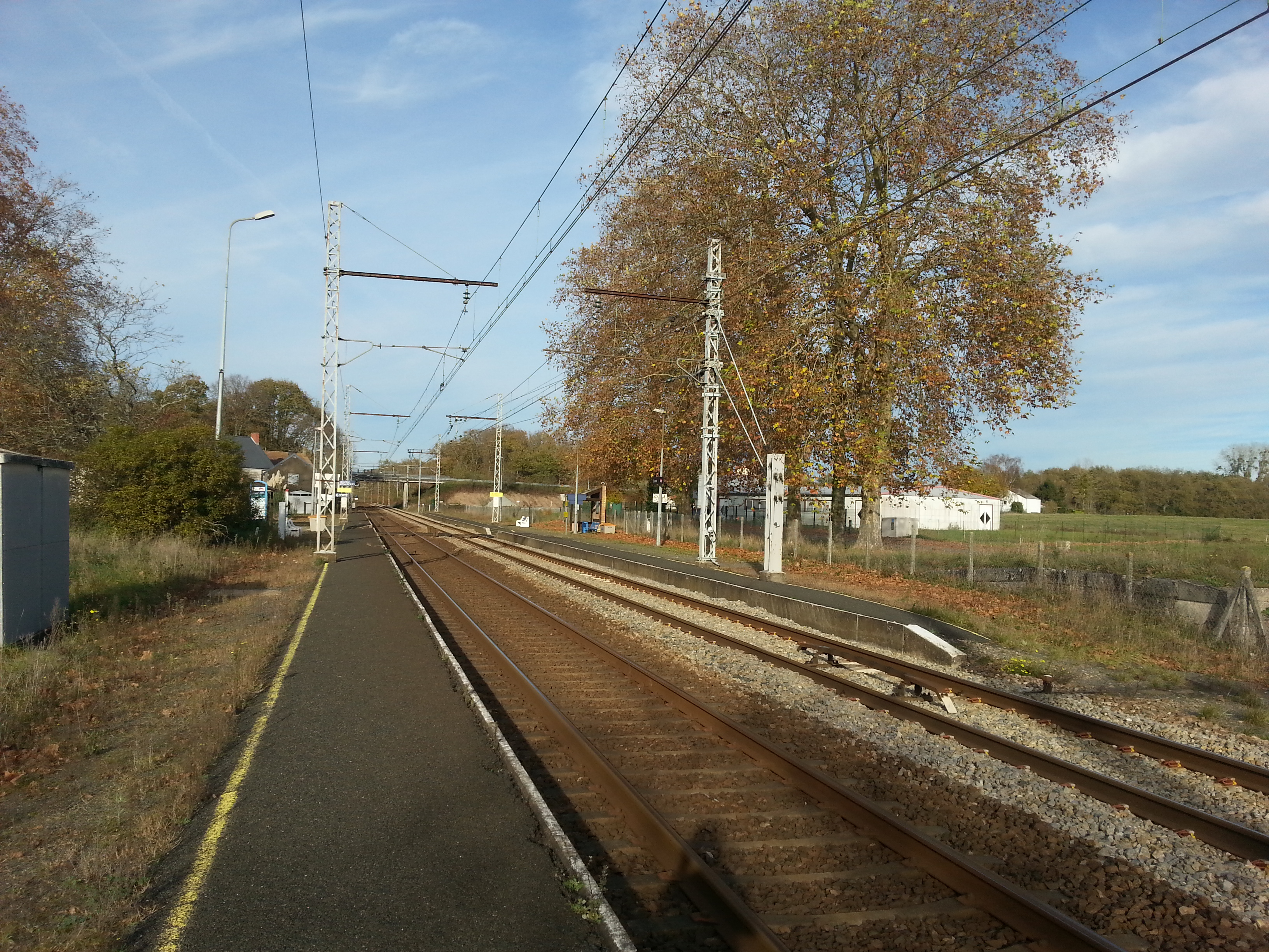 Gare de Luant (36) : Vue générale de la gare.